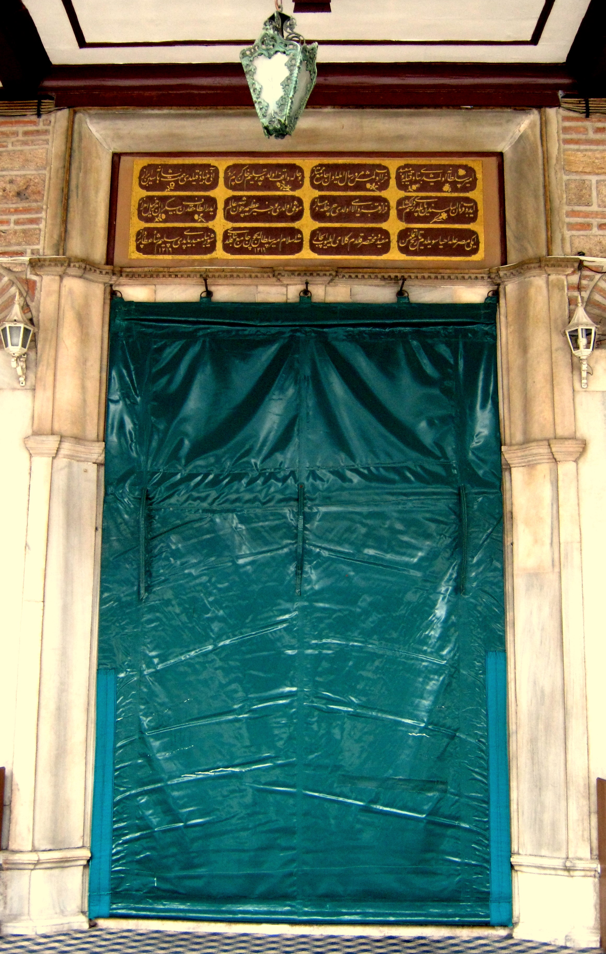 EMİRSULTAN CAMİİ